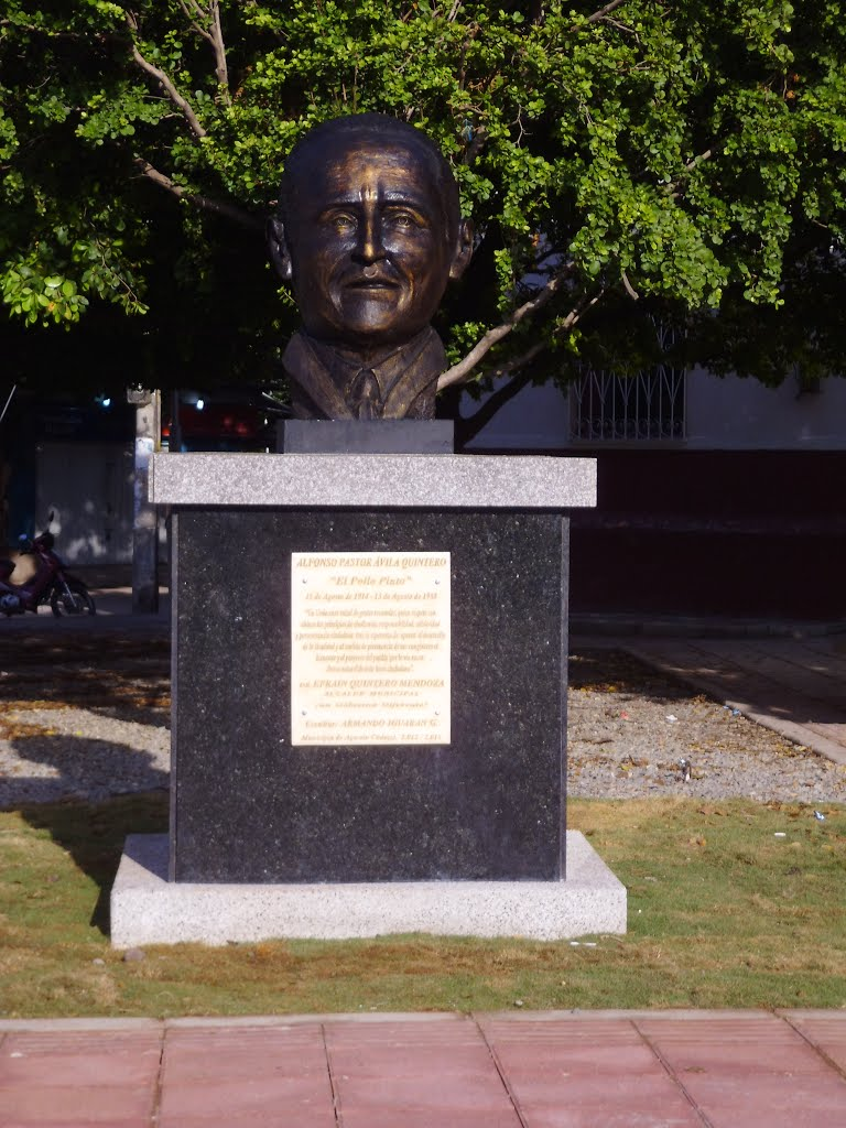 Monumento a Álfonso Ávila Quintero